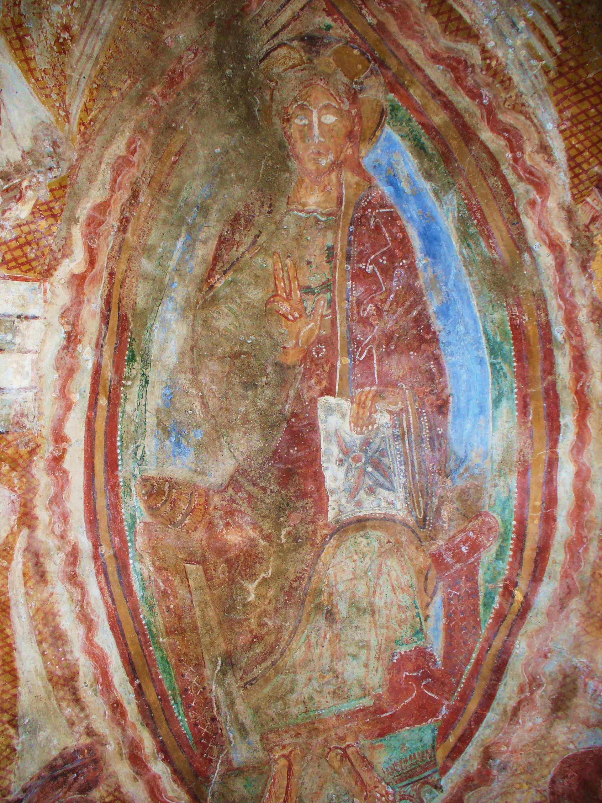 Fresko in der Kapelle Saint-Martin-de-Fenollar